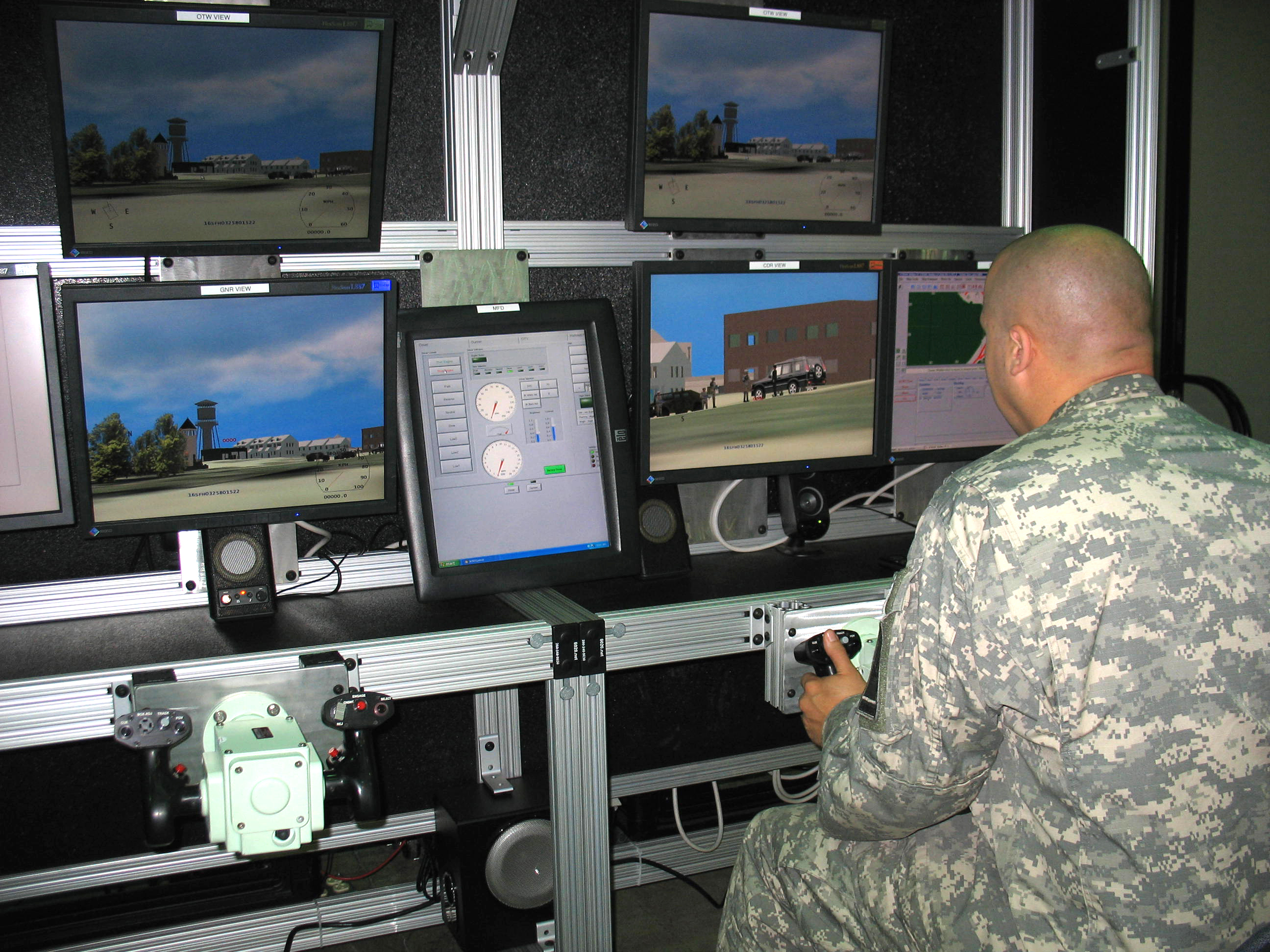 ACRT Simulator